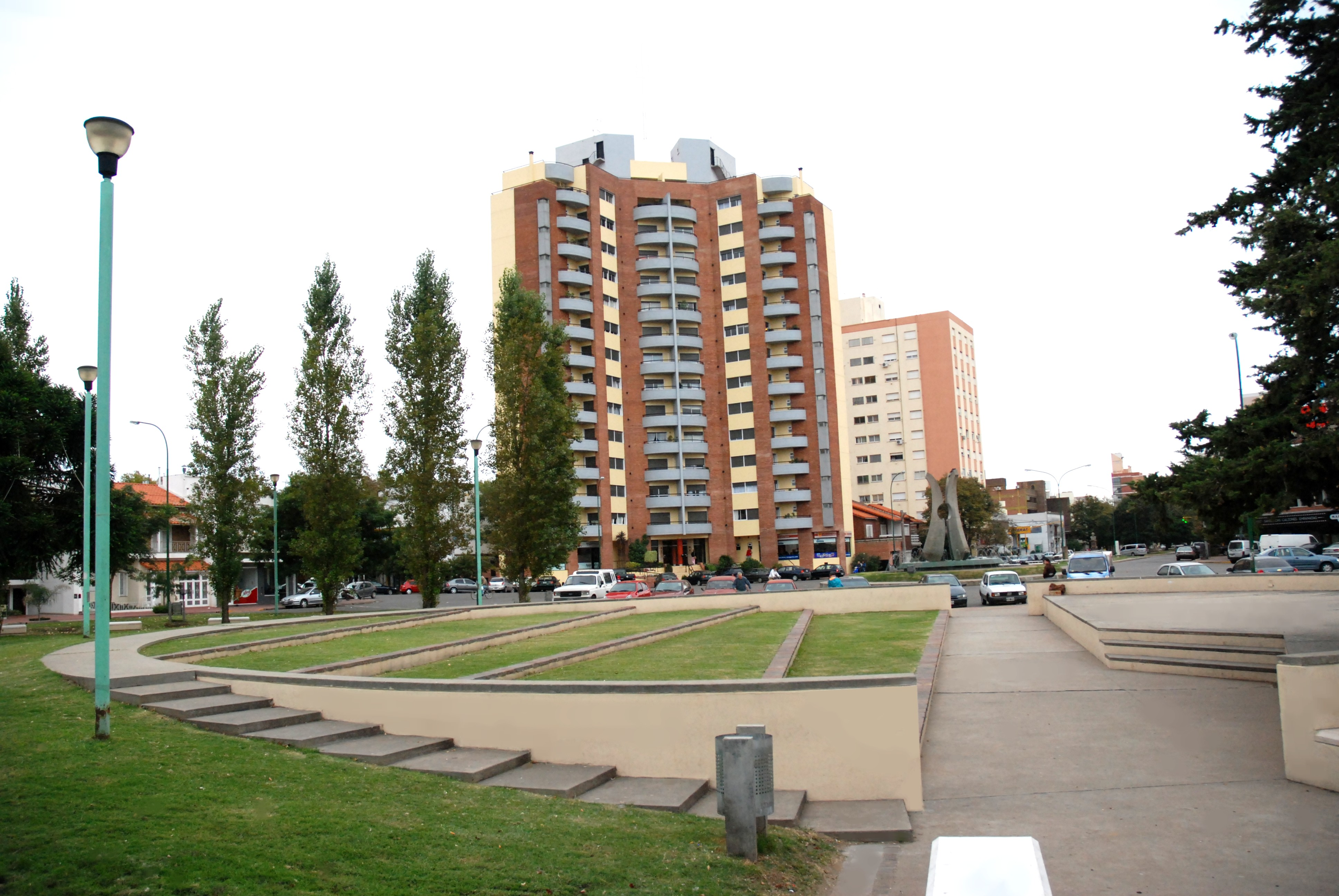 Plaza Fuerzas Armadas, en Junín, Argentina.